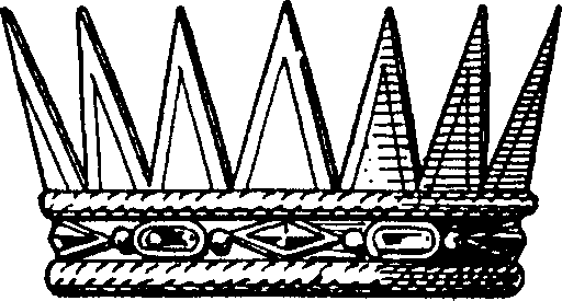 "Die Zackenkrone (Fig. 53), auch antike oder Heidenkrone, Davidskrone genannt, zeigt einen Stirnreif mit 12 Zinken in der Runde von denen sieben sichtbar sind. Die 12 spitzen Zacken haben eine symbolische Bedeutung und stehen im Bezuge zu den 12 Strahlen (Monaten) der Sonne. Im mittleren Staatswappen von Oesterreich ruht diese Krone auf dem Schilde des Königreichs Illyrien. Im Wappen von San Marino erscheint eine Zackenkrone als Stirnreif der Bügelkrone."